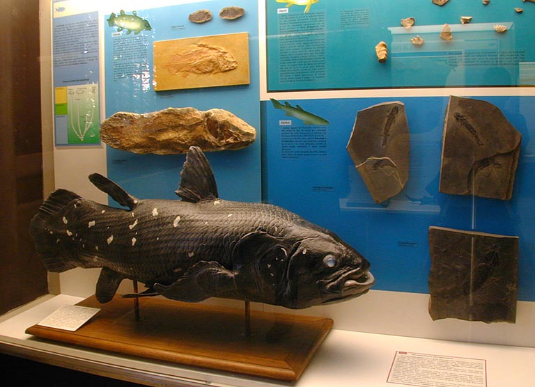 Calco di un Latimeria chalumnae, del museo civico di storia naturale di Milano.